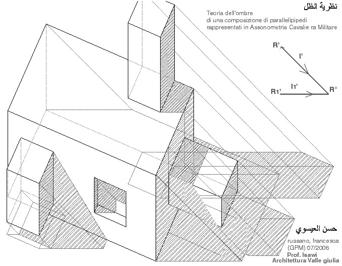 teoria delle ombre assonometria cavaliera militare